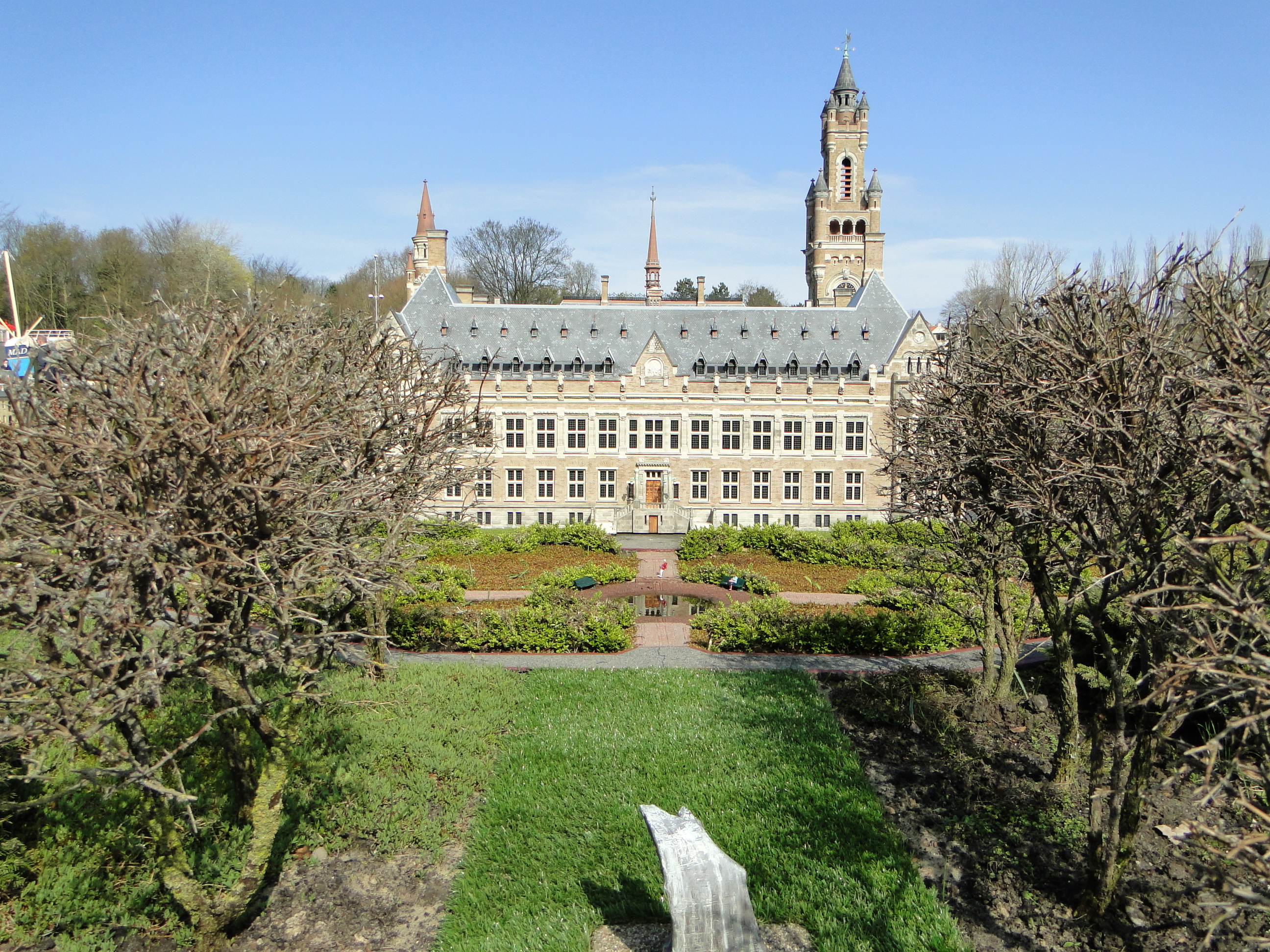 Den Haag